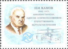 Купон марочного листа — Камов Николай Ильич, Герой Социалистического Труда